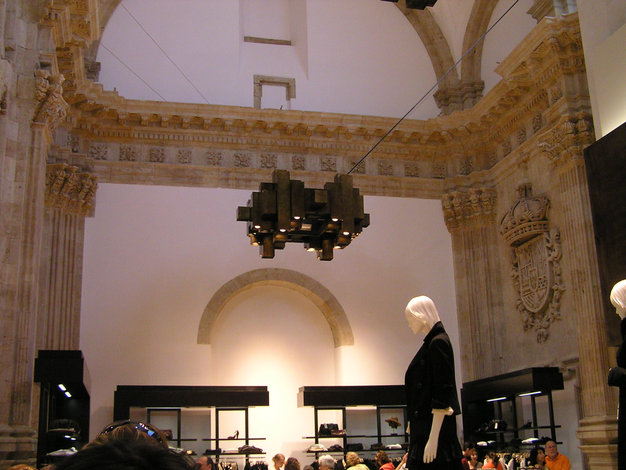 Restos del Convento de San Antonio el Real en Salamanca, actualmente tienda Zara.